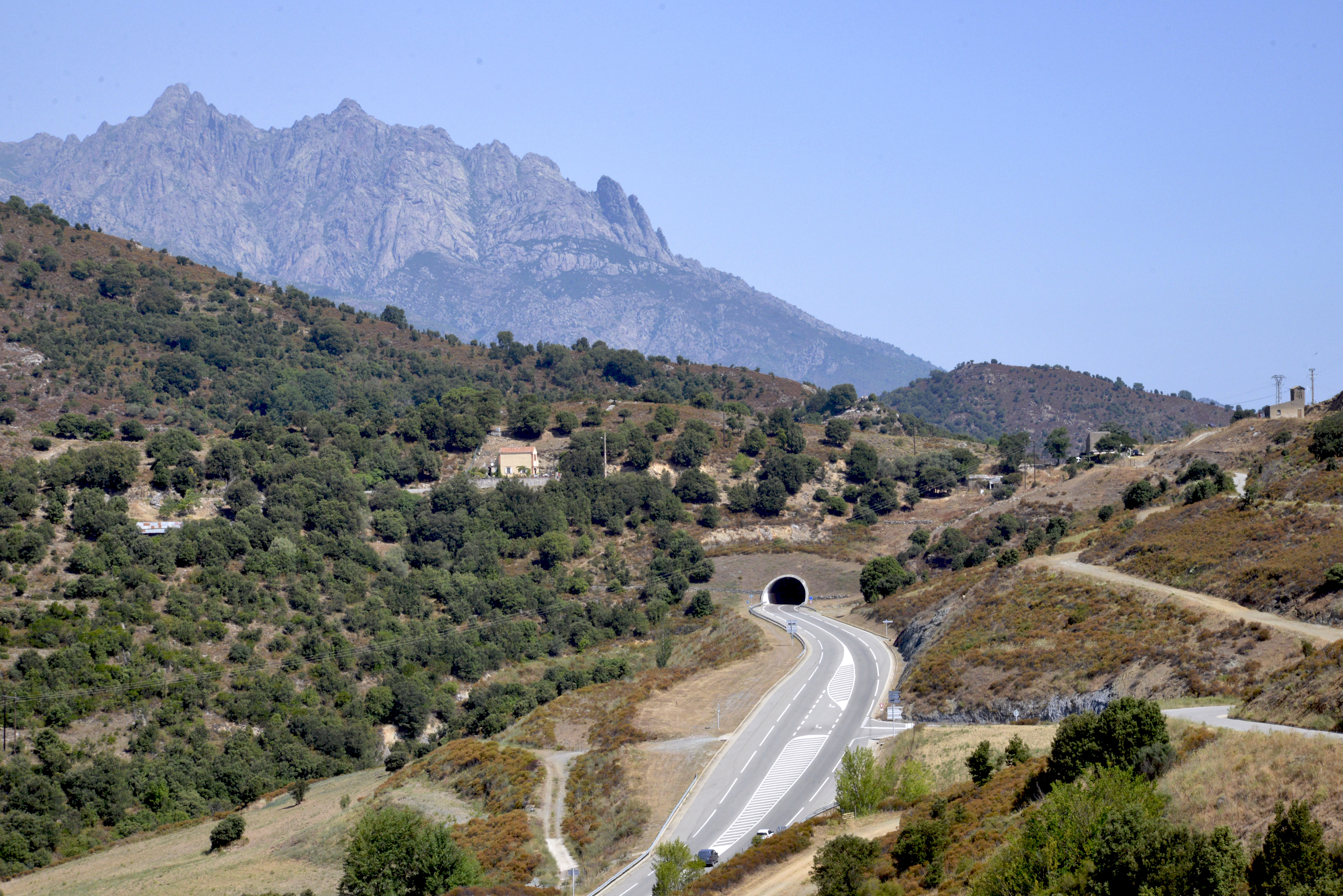 Tralonca, Cortenais (Haute-Corse) - Le col de San Quilico (559 m) sous lequel a été percé le tunnel de la route territoriale 20. À l'arrière-plan, les aiguilles de Popolasca.